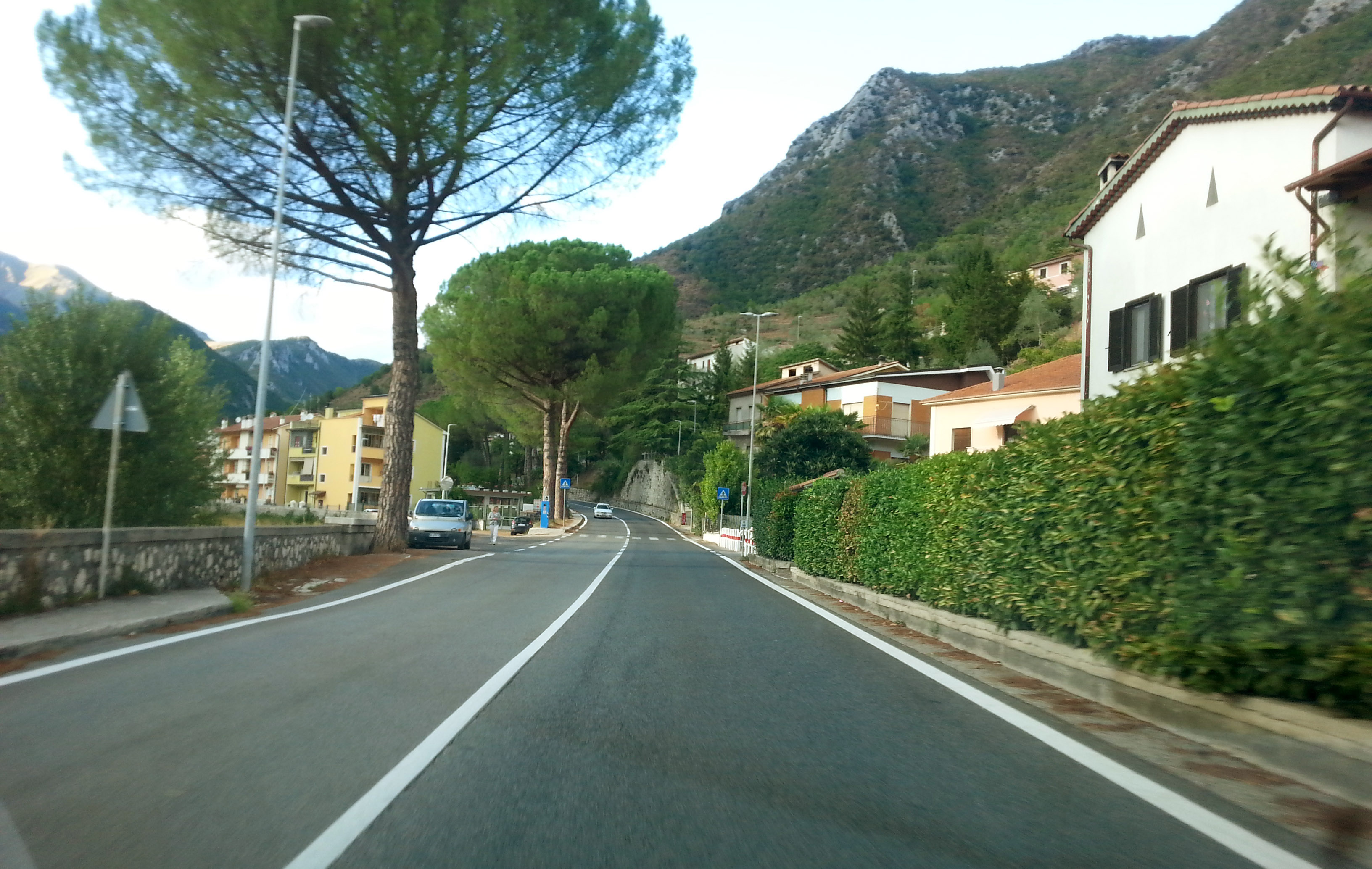 La strada statale 4 Via Salaria nel tratto della "Circonvallazione di Antrodoco" (la variante esterna al centro abitato costruita negli anni Cinquanta)